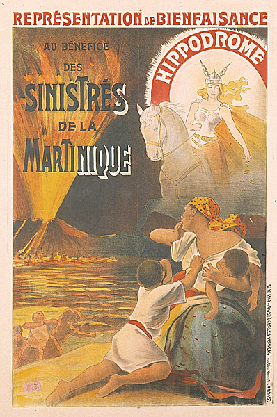 Affiche en couleurs illustrée représentant une femme et ses enfants devant l'éruption du volcan de la montagne Pelée